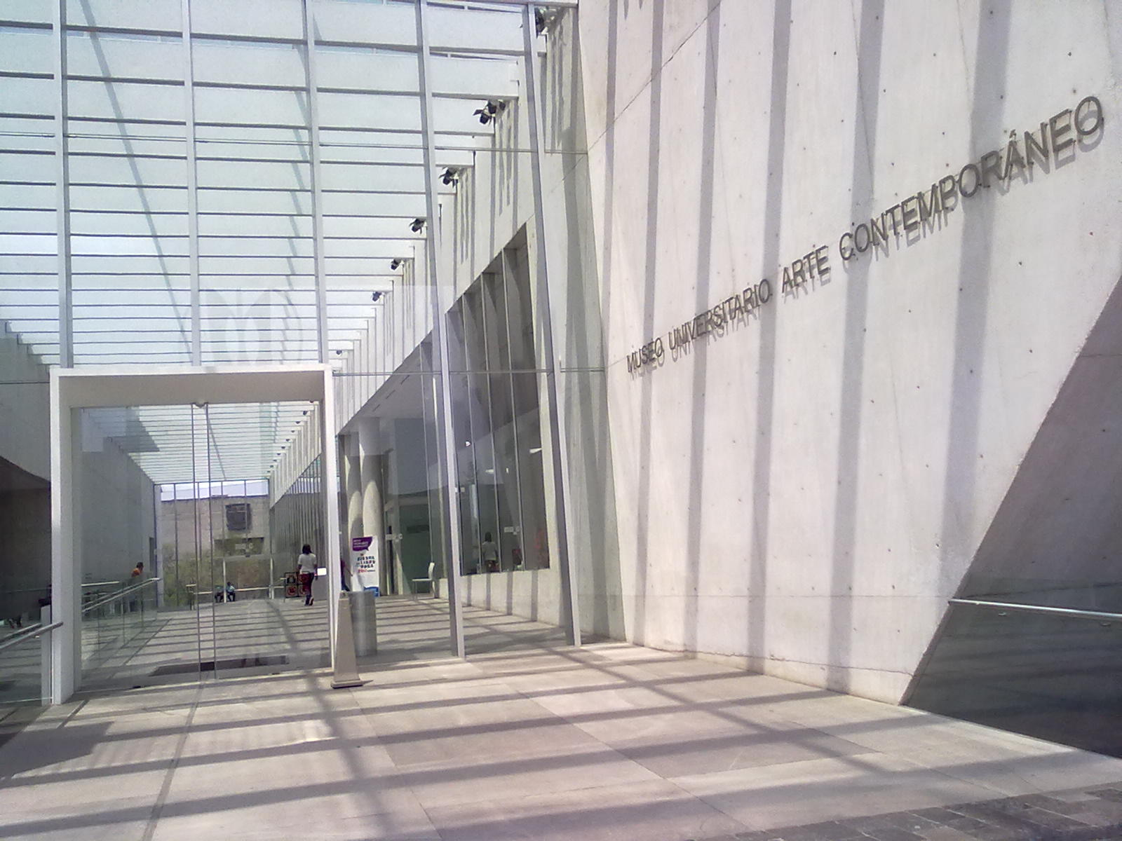 MUAC entrada al museao